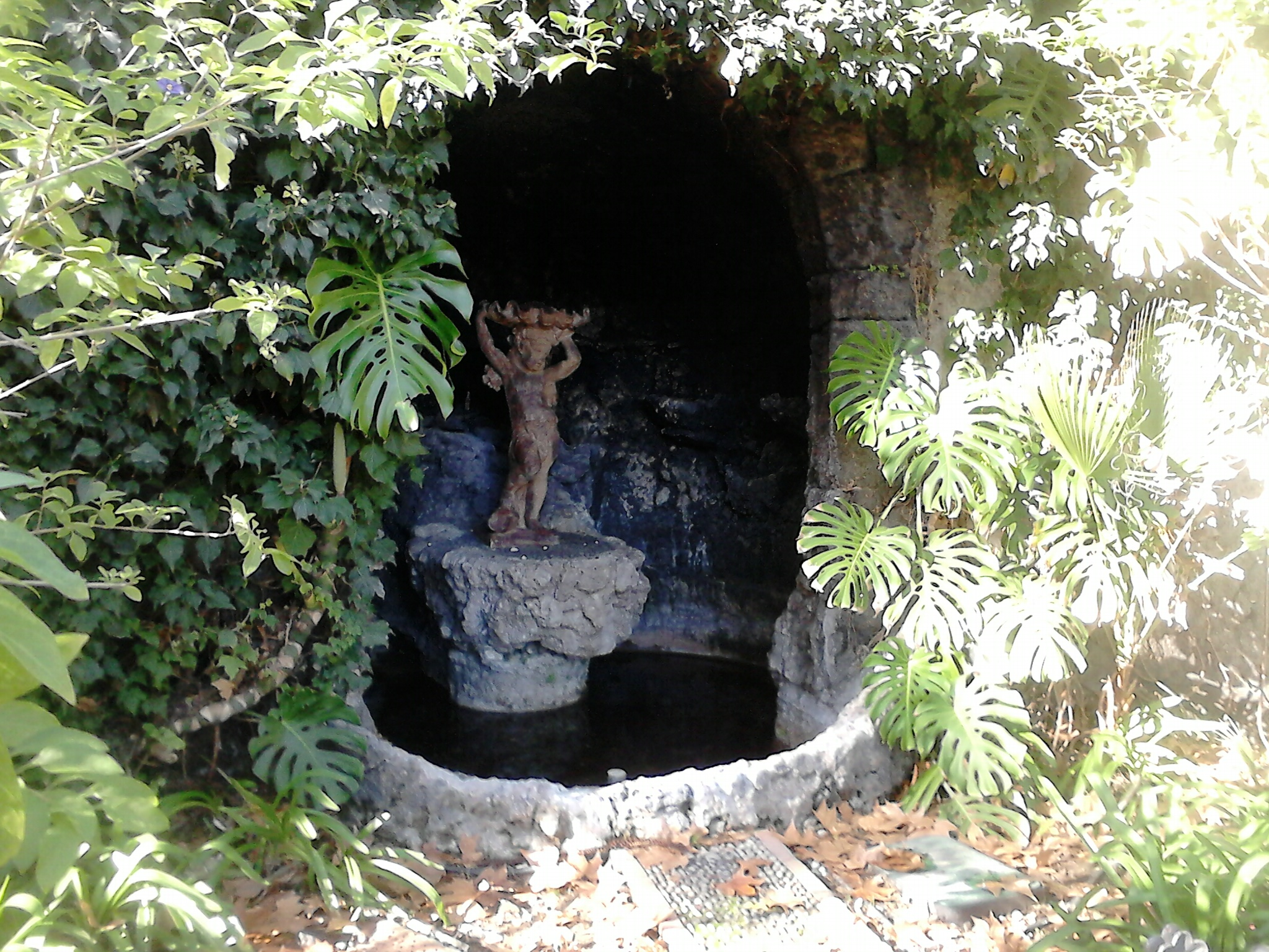 Fontanella in grotta con gruppo statuario